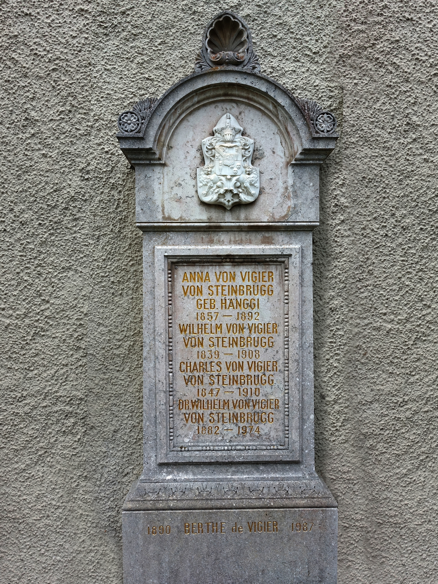 Wilhelm Vigier von Steinbrugg (1839-1908) Politiker. Wilhelm Vigier von Steinbrugg (1847–1910), Wilhelm Vigier von Steinbrugg (1882–1974) Familien Grab bei der Kirche St. Niklaus, Feldbrunnen-St. Niklaus, Schweiz